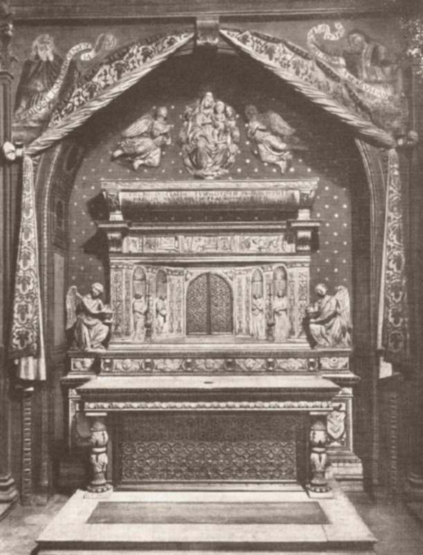 Benedetto da maiano, altare di santa fina, 1870 picture